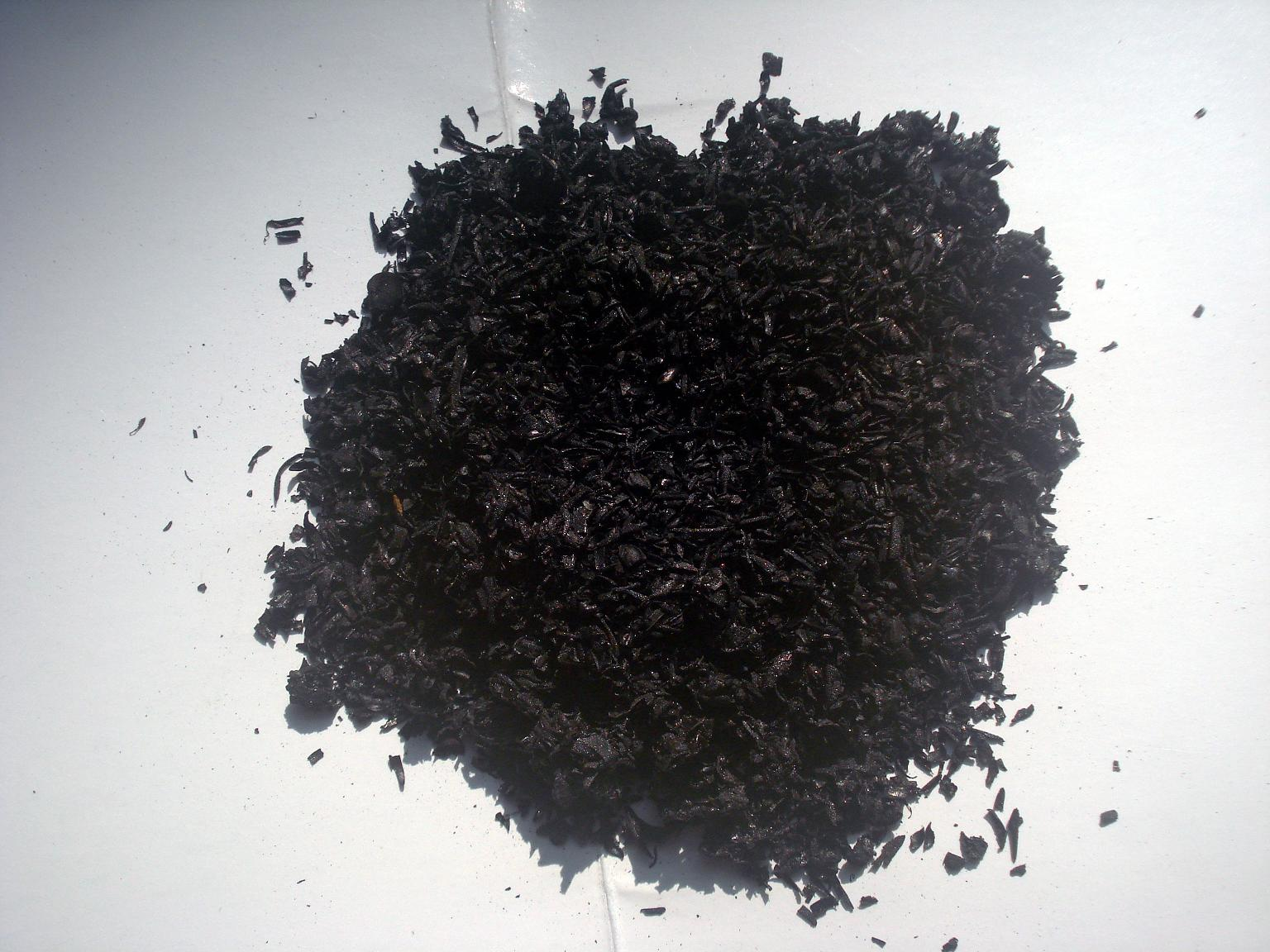 നെല്ലിന്റെ പുറം‌പാളിയായ ഉമി കരിച്ചാൽ ലഭിക്കുന്നതാണ് ഉമിക്കരി. കേരളീയർ പല്ല് വൃത്തിയാക്കാൻ ഉമി കരിച്ച് ഉപയോഗിക്കാറുണ്ട്.